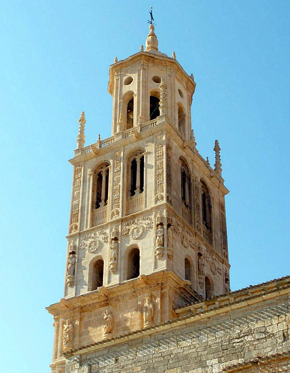 Iglesia de la Asunción de Nuestra Señora, en Santa María del Campo (Burgos)